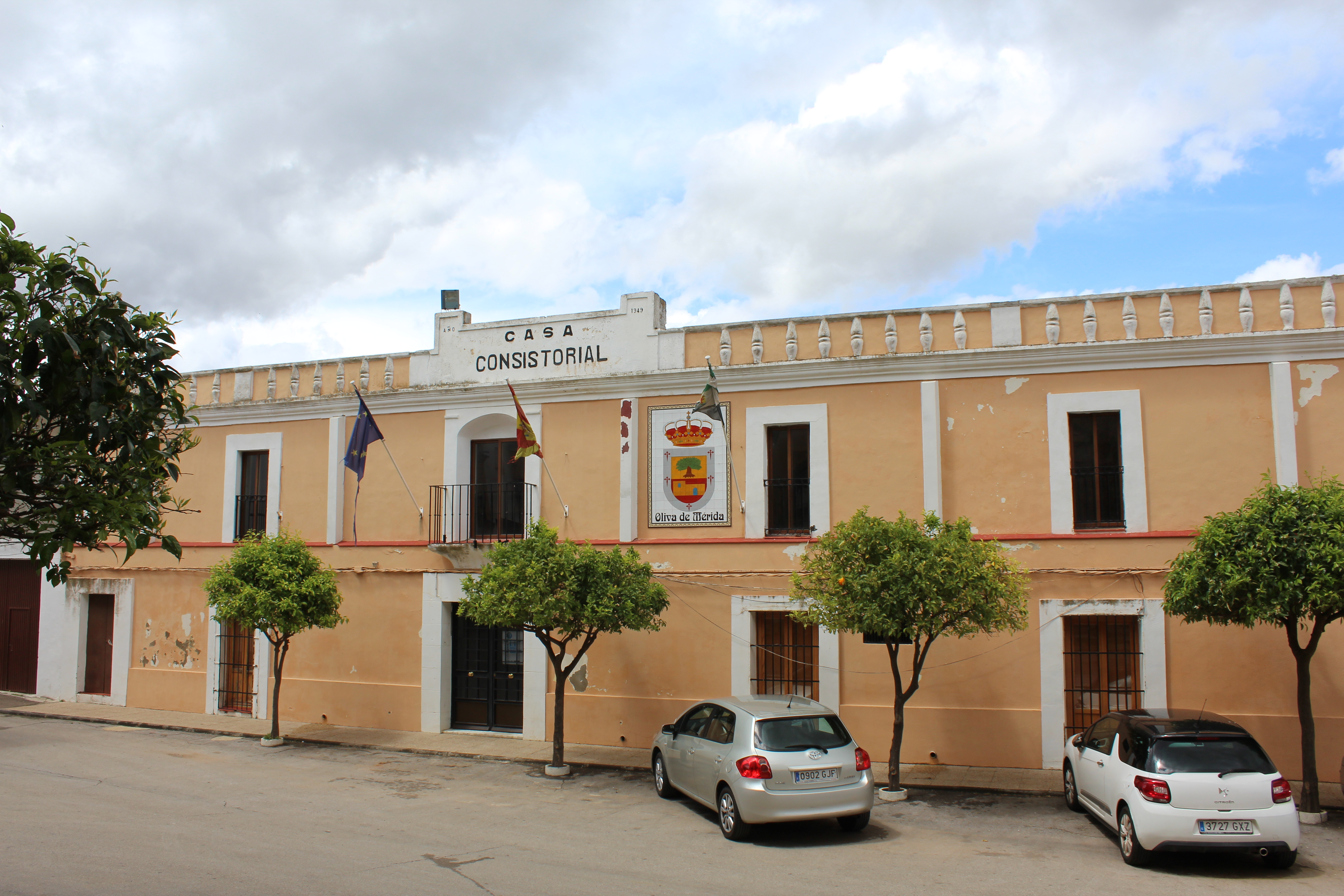 Oliva de Mérida. Ayuntamiento